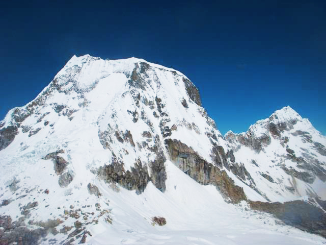 Vista de la cara norte del Ranrapalca